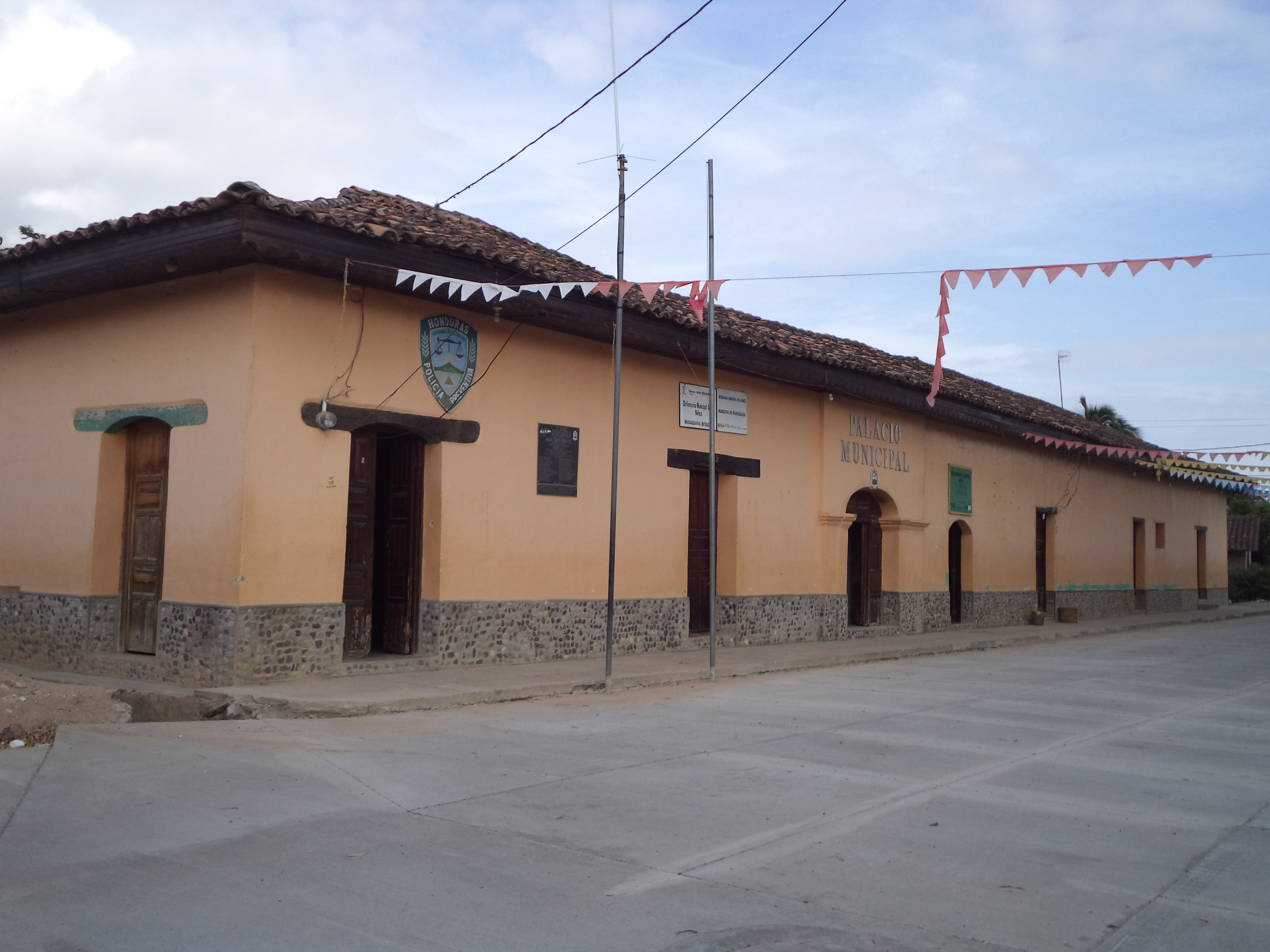 Edificio donde funciona la Alcaldía Municipal de Masaguara